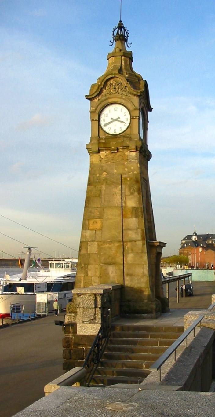 Düsseldorf Rheinufer Normaluhr und Pegel